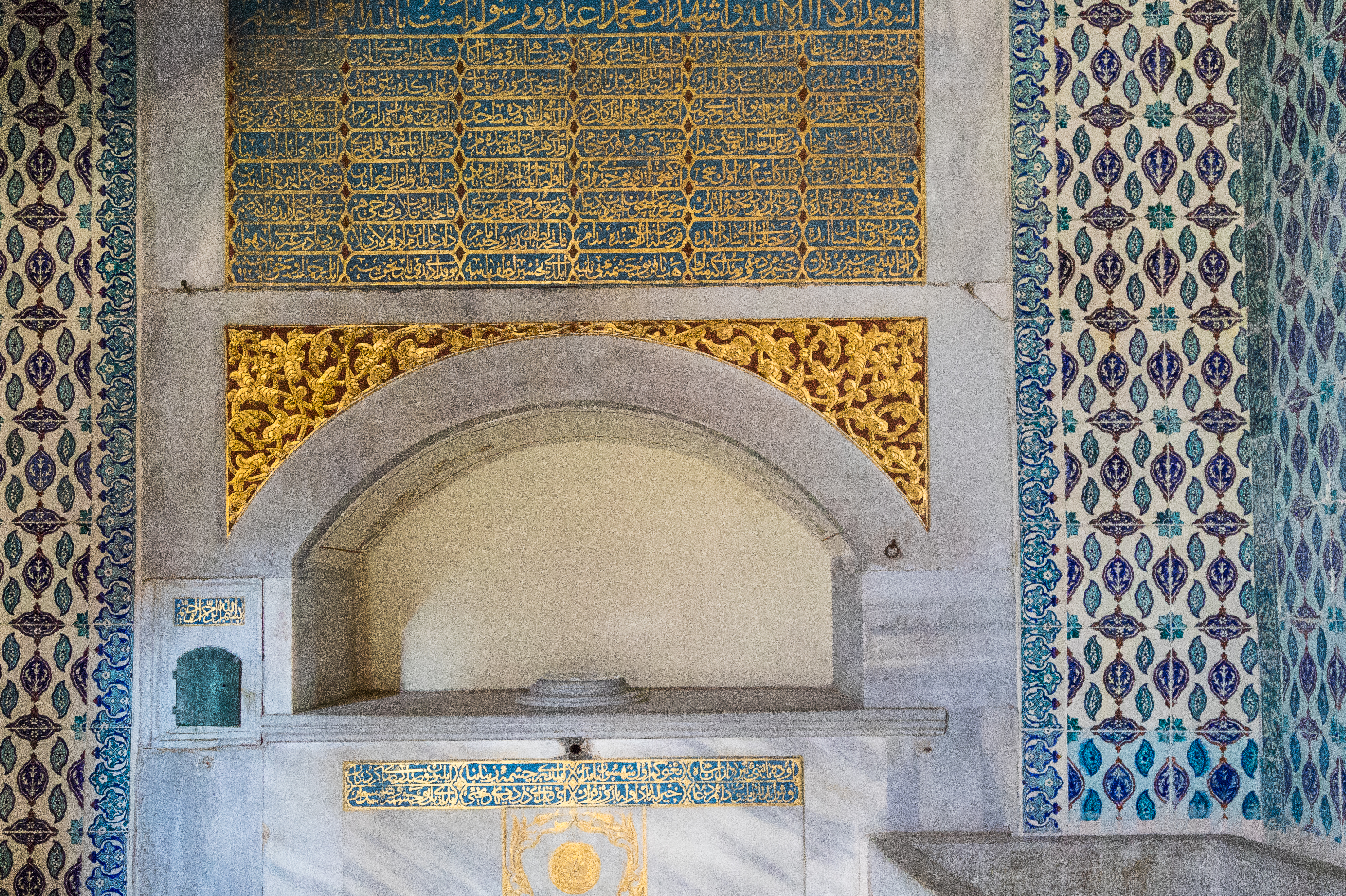 particolare decorazione di un muro